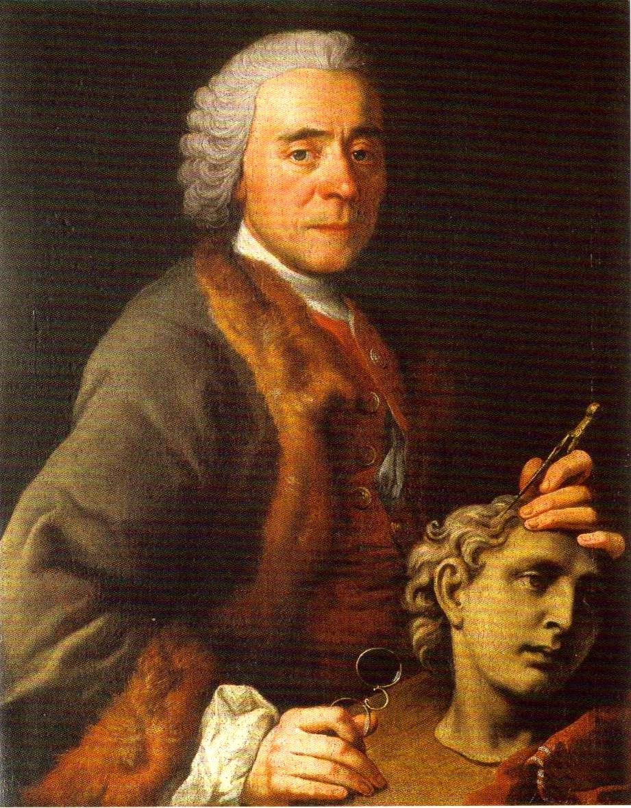 Portrét sochaře Ondřej Schweigla - neznámy autor (18. stol.)